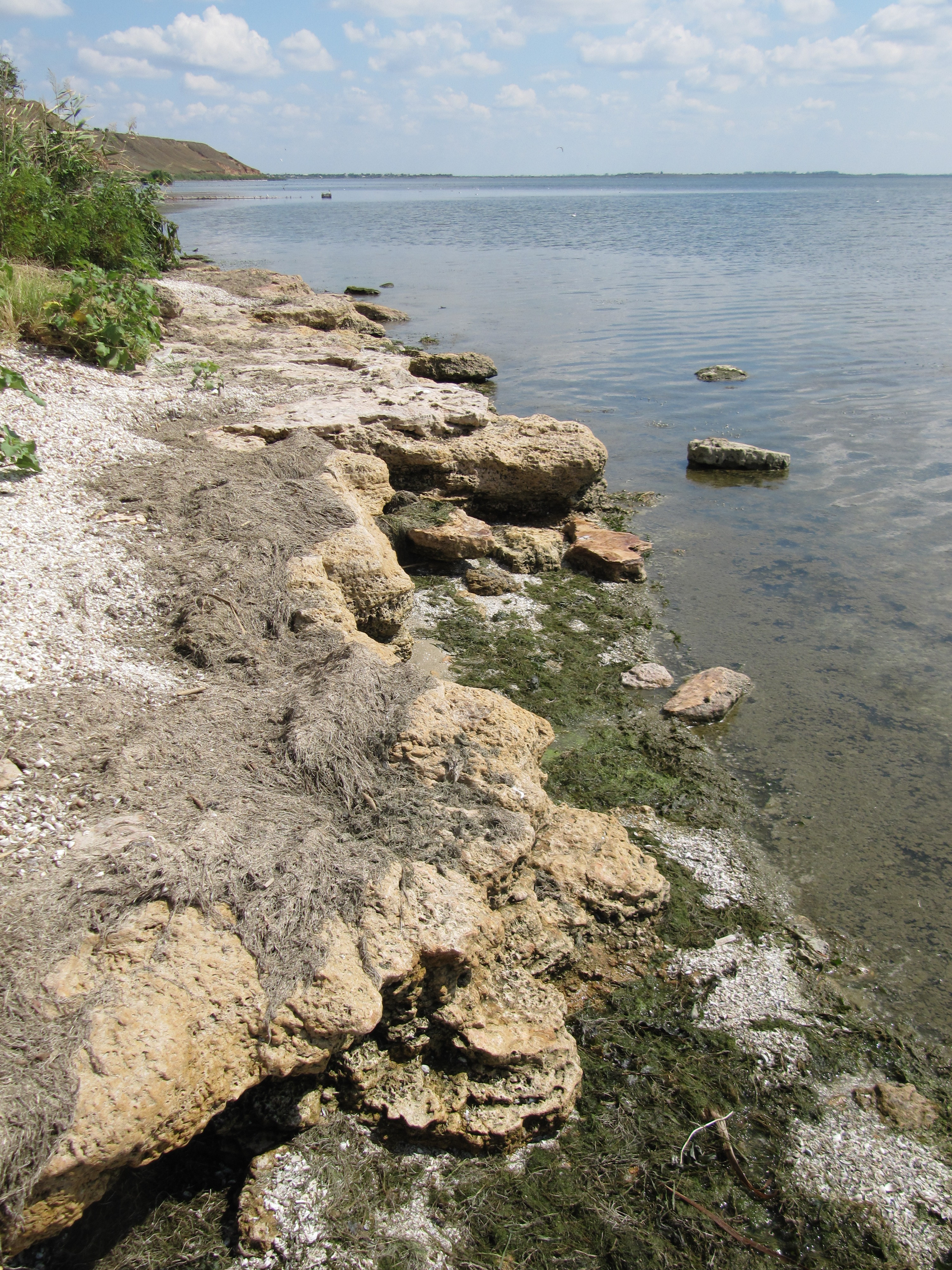 Городище в урочищі Золотий Ріг, с. Широка Балка